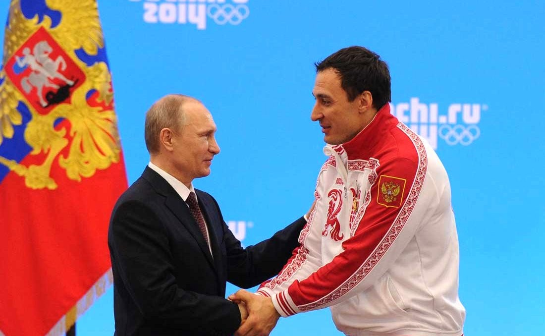 Орденом «За заслуги перед Отечеством» четвёртой степени награждён двукратный олимпийский чемпион в бобслее Алексей Воевода.